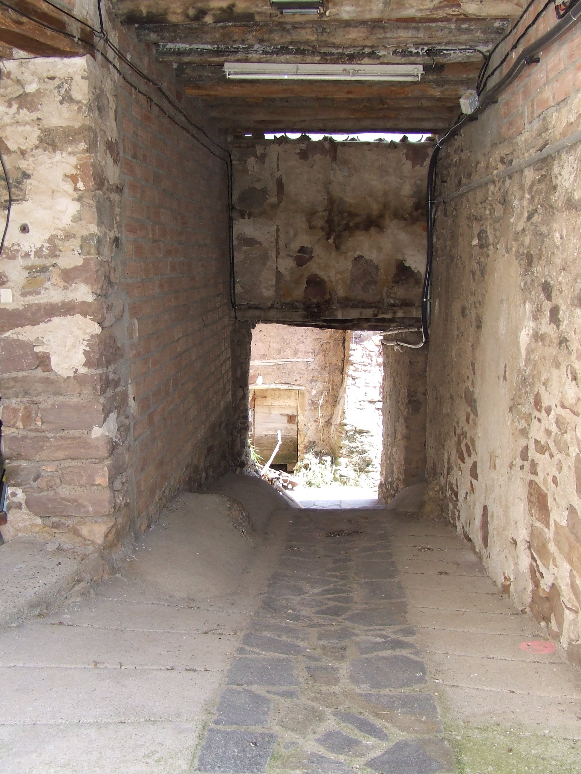 Antic portal del poble de les Esglésies (Sarroca de Bellera, Pallars Jussà)